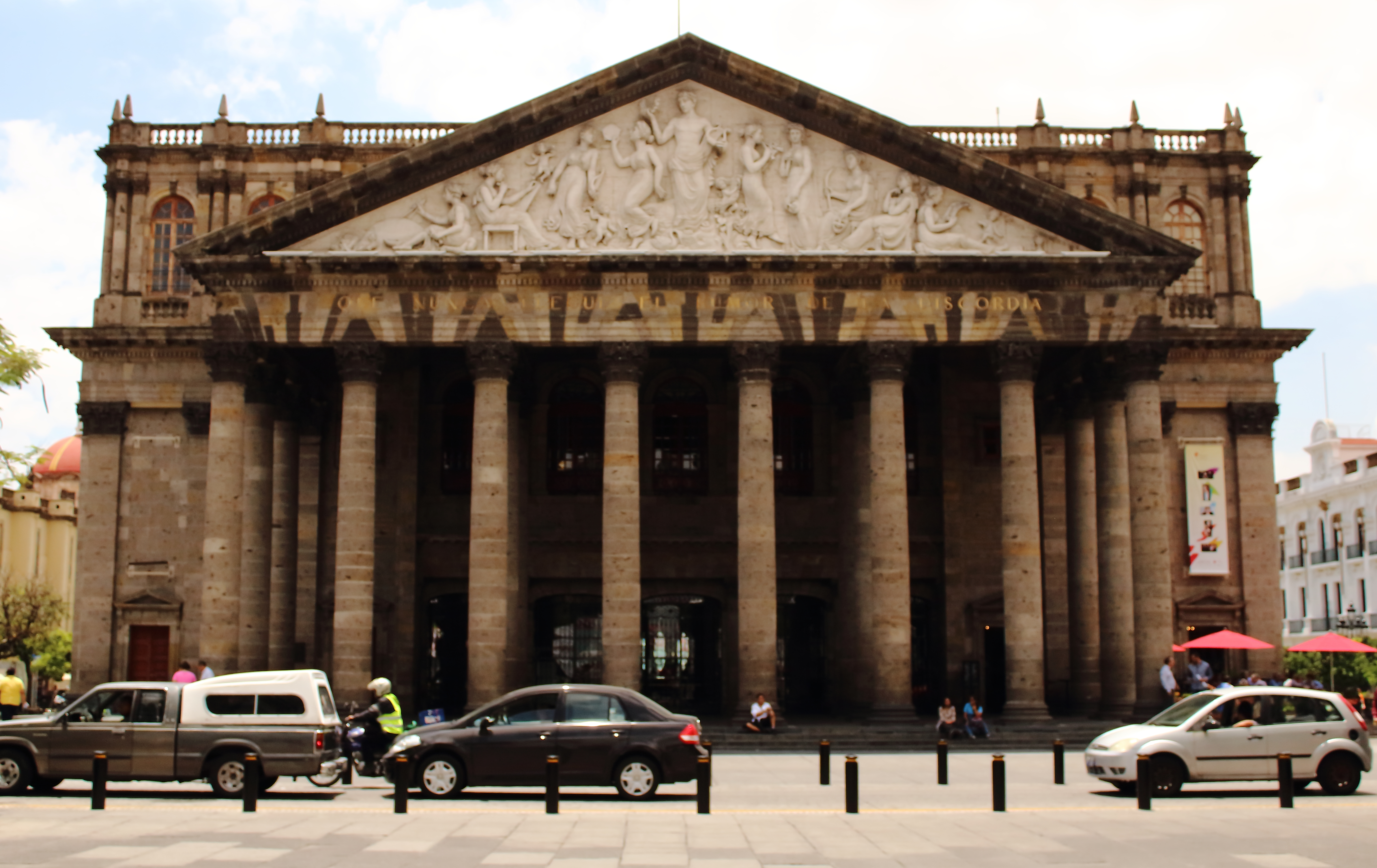 El Teatro degollado es un edificio de mediados del siglo XIX, ubicado en la ciudad mexicana de Guadalajara. El inmueble es escenario habitual de recitales, conciertos, espectáculos de danza clásica y contemporánea. Asimismo es la sede de la Orquesta Filarmónica de Jalisco.